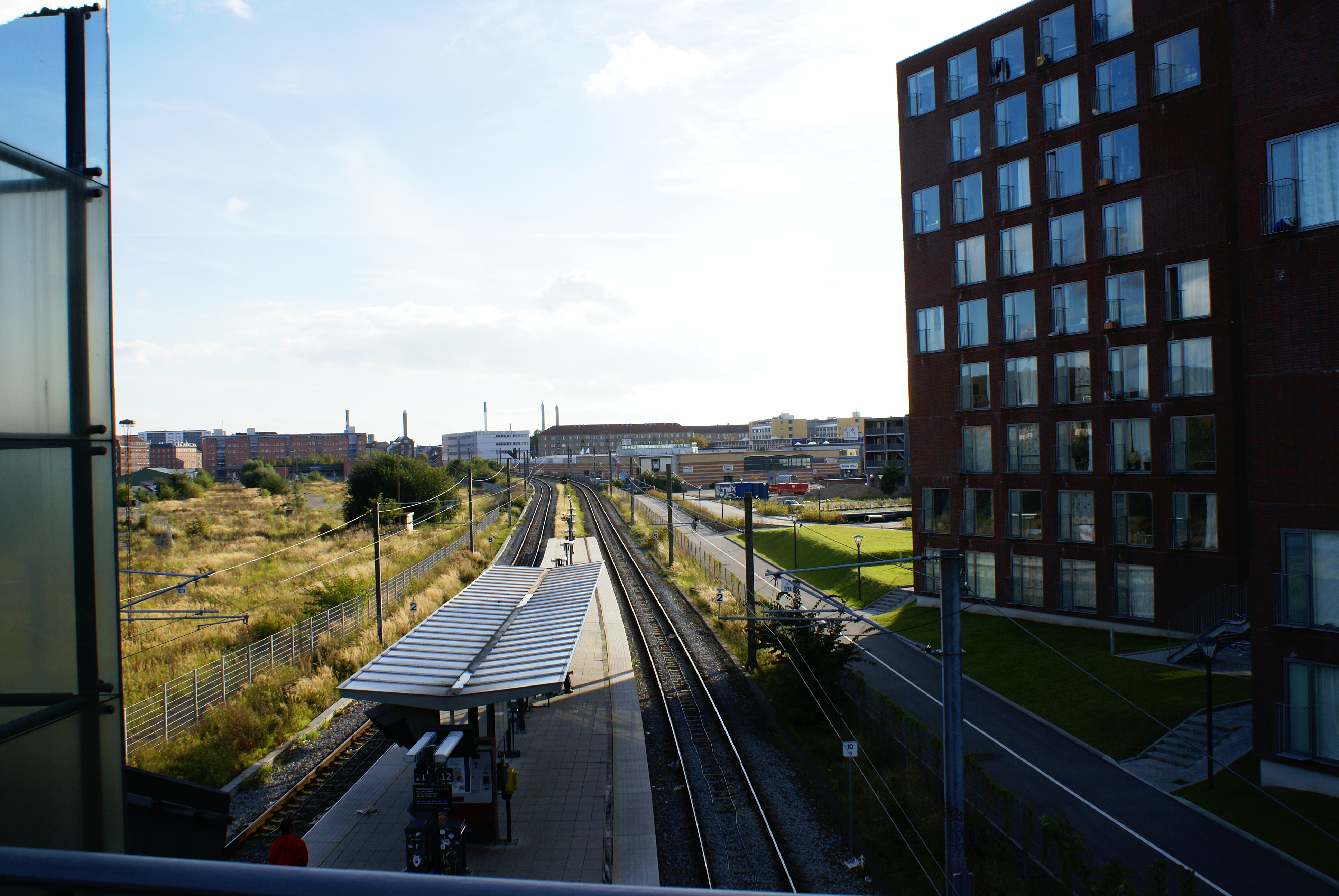 Keops Kollegiet, right next to Bispebjerg Station